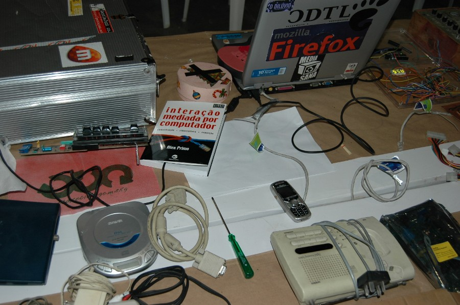 Mesa de trabalho de MetaReciclagem no Campus Party, maior encontro de comunidades da Internet do mundo (2009)